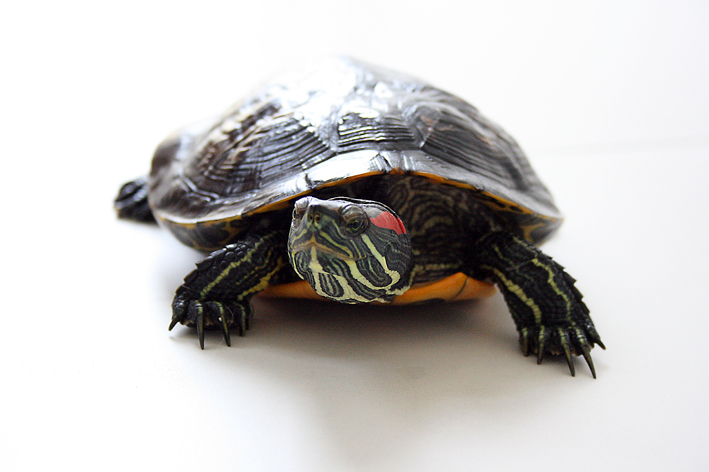 Tartaruga-do-ouvido-vermelho (Trachemys scripta elegans) macho.